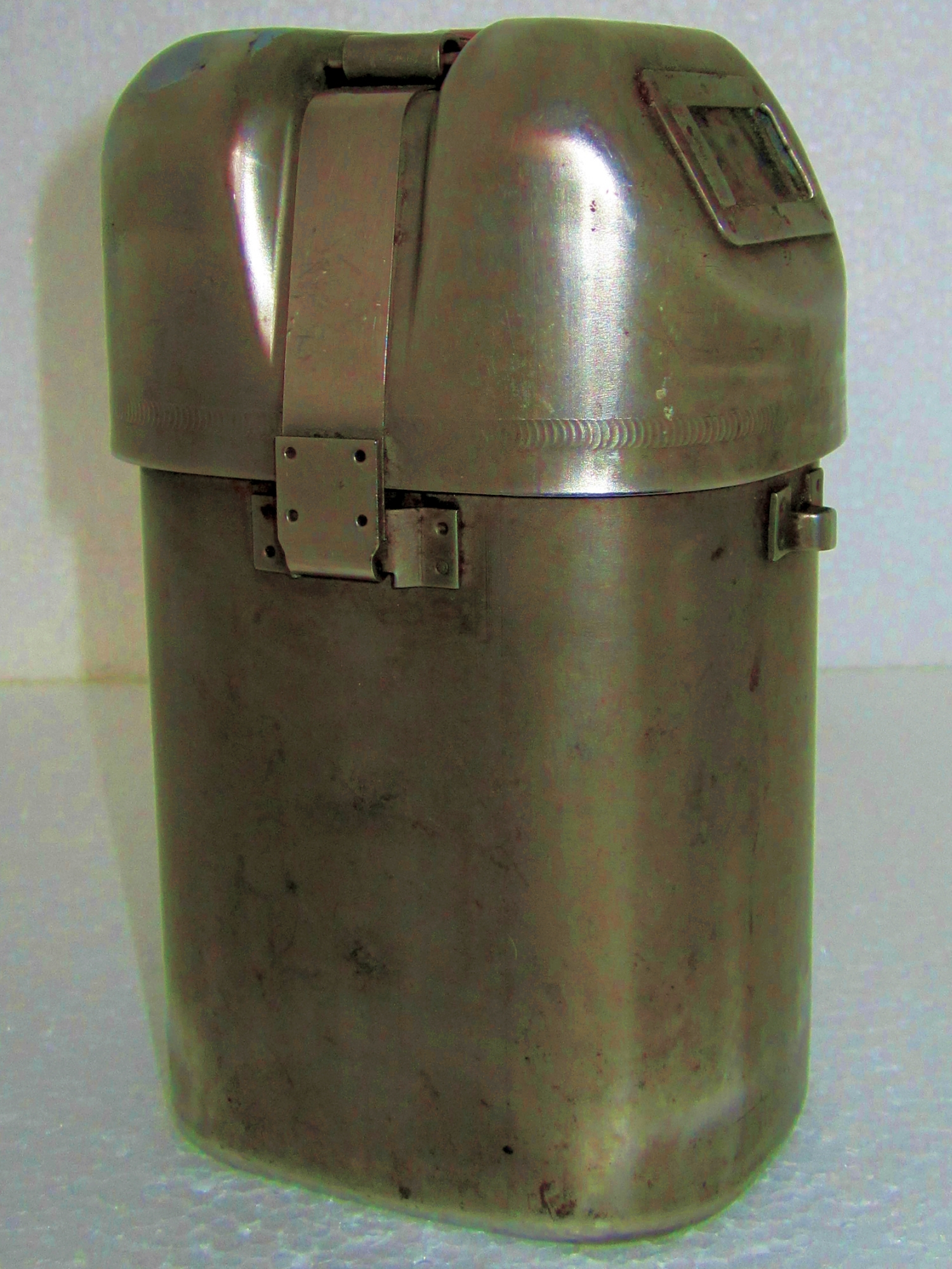 Auer Filterselbstretter W65-2, geschlossen und verplombt